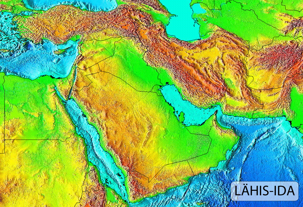 Lähis-Ida reljeef